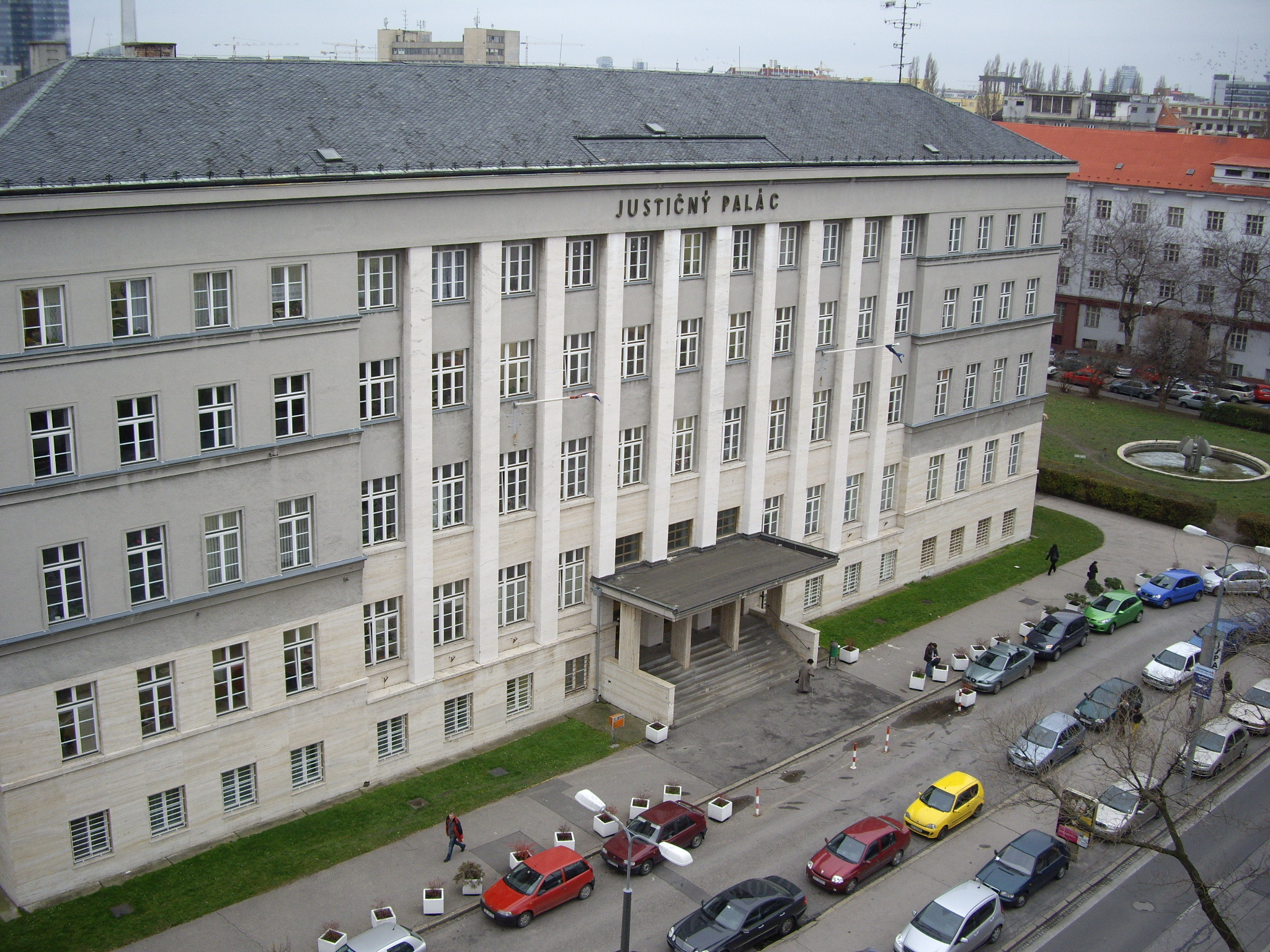 JUSTIČNÝ PALÁC